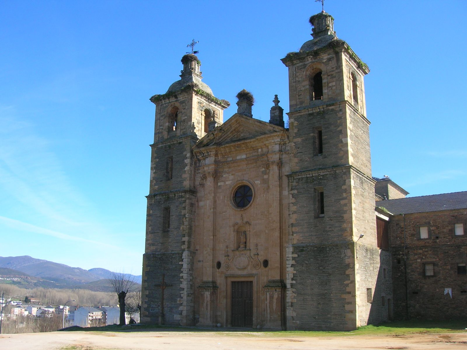 Está considerado como el monasterio más importante del Bierzo dentro del estilo neoclásico. Esta foto participó en el juego En un lugar de Flickr. Se trata de adivinar el lugar de la fotografía. No contestes si no estás registrado en el juego!!!!. Si deseas contestar, únete primero! muchas gracias.